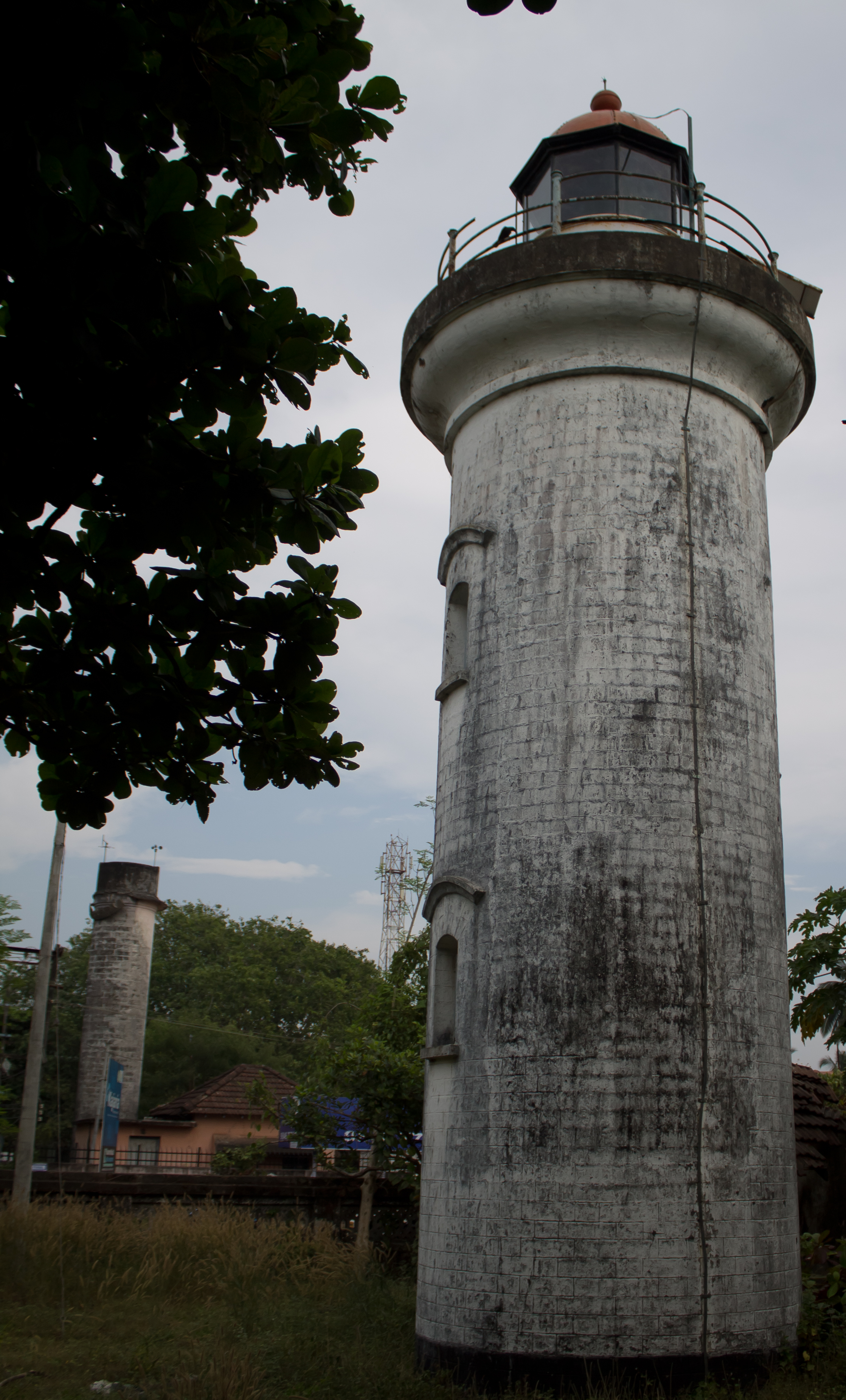 കോഴിക്കോട് വിളക്കുമാടത്തിന്റെ ദൃശ്യം. പിന്നിലായി കാലാവസ്ഥാനിരീക്ഷണകേന്ദ്രത്തിന്റെ സ്തംഭം കാണാം.